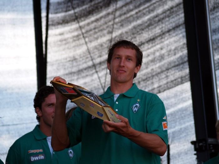 Frank Baumann beim Tag der Fans